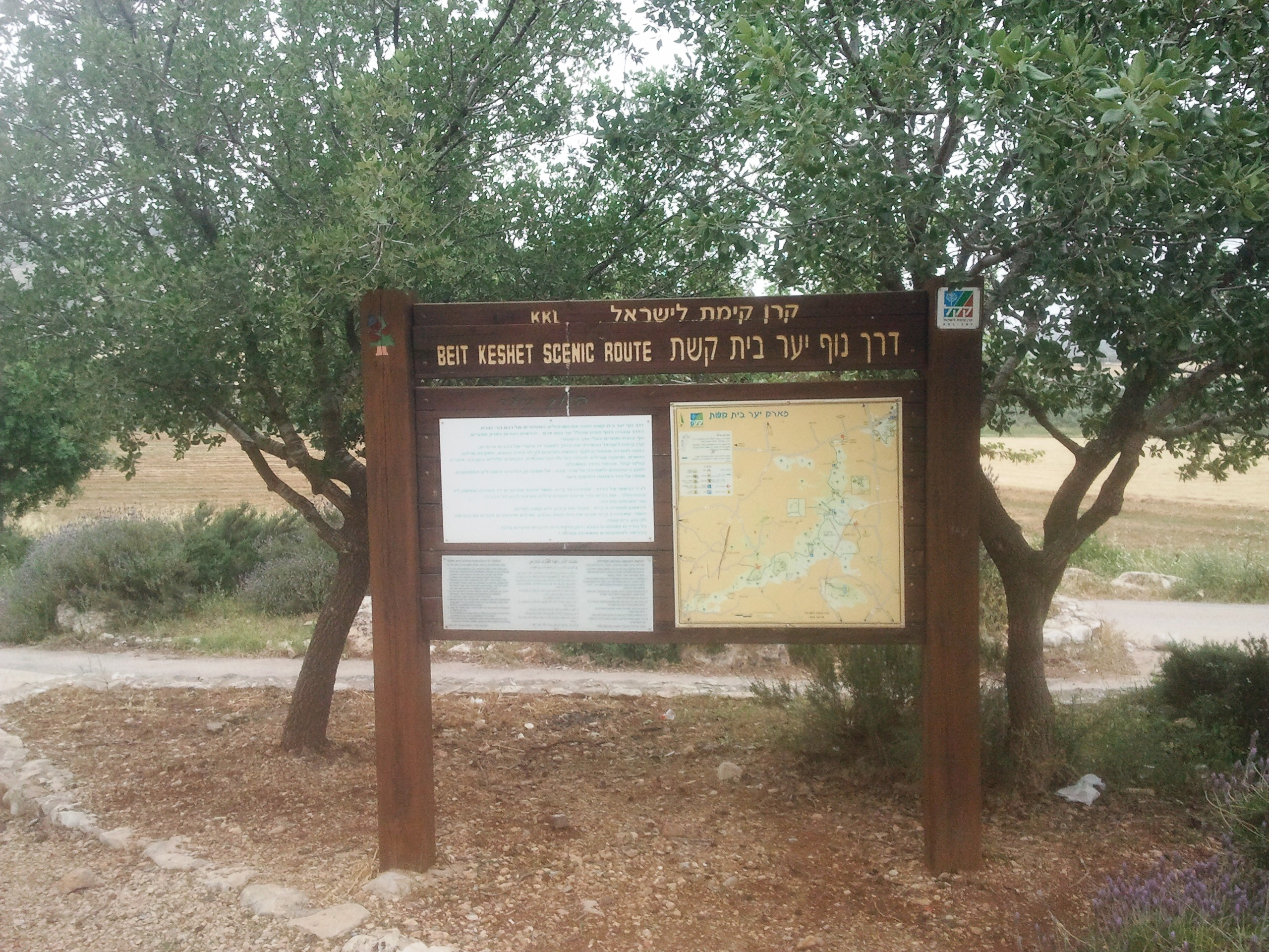 דרך נוף בית קשת היא דרך נופית בגליל התחתון הכניסה הצפונית